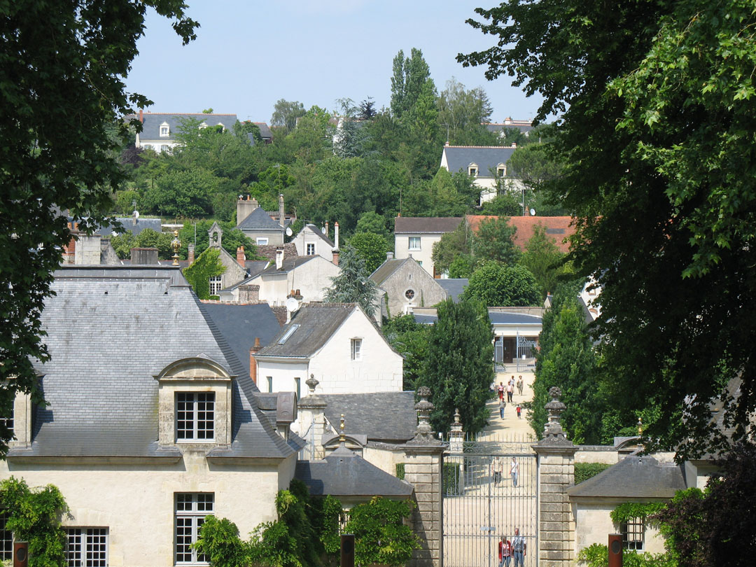 Azay-le-Rideau, vu du château, France